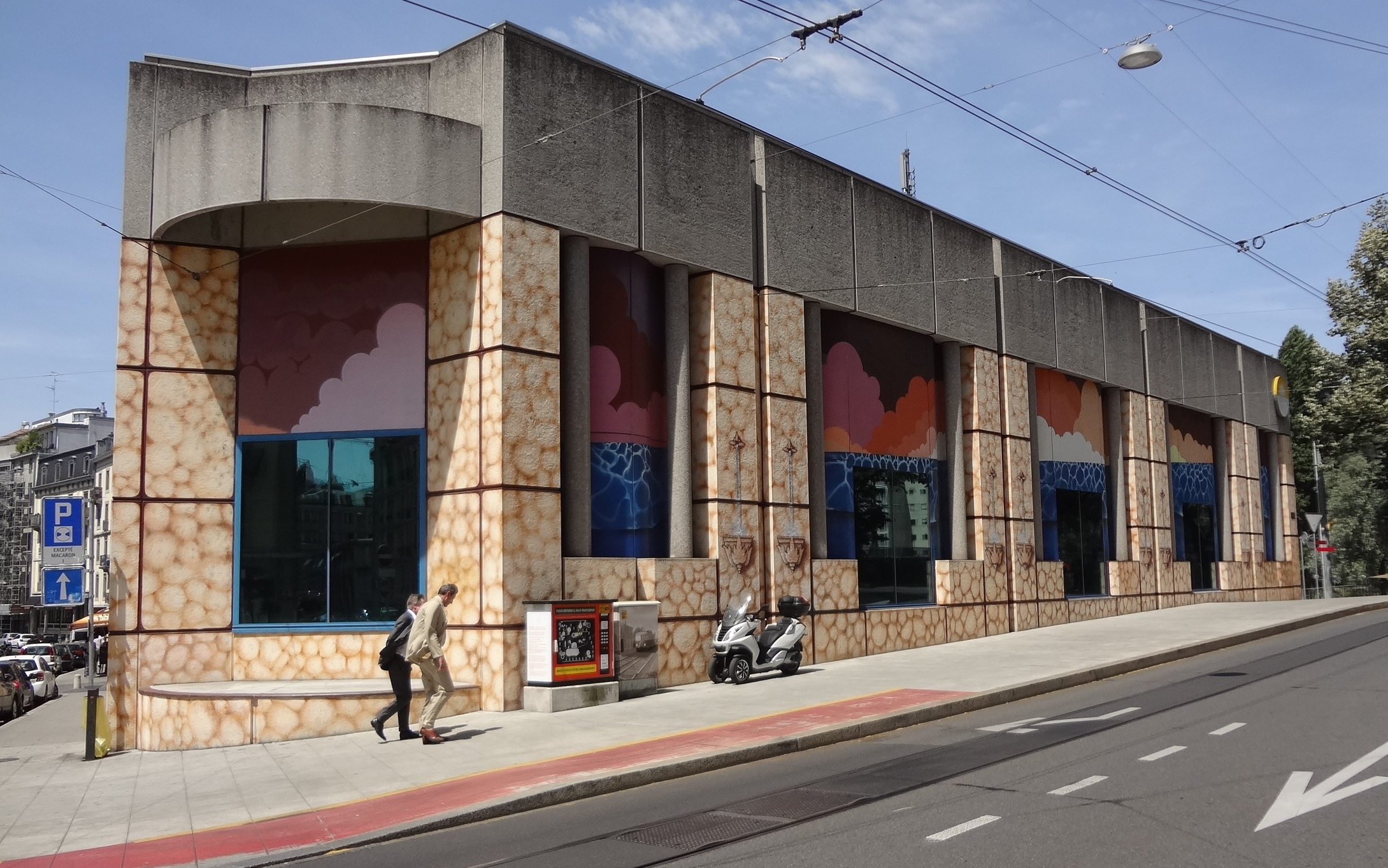 Station de pompage des Services industriels de Genève à la rue de l’Arquebuse à Genève, où l’eau potable tirée du Lac Léman arrive de la station du Prieuré (Les Pâquis) par une conduite sous-lacustre de 2,2 km de long pour être distribuée à 300’000 mille personnes. Angle Sud-Est.